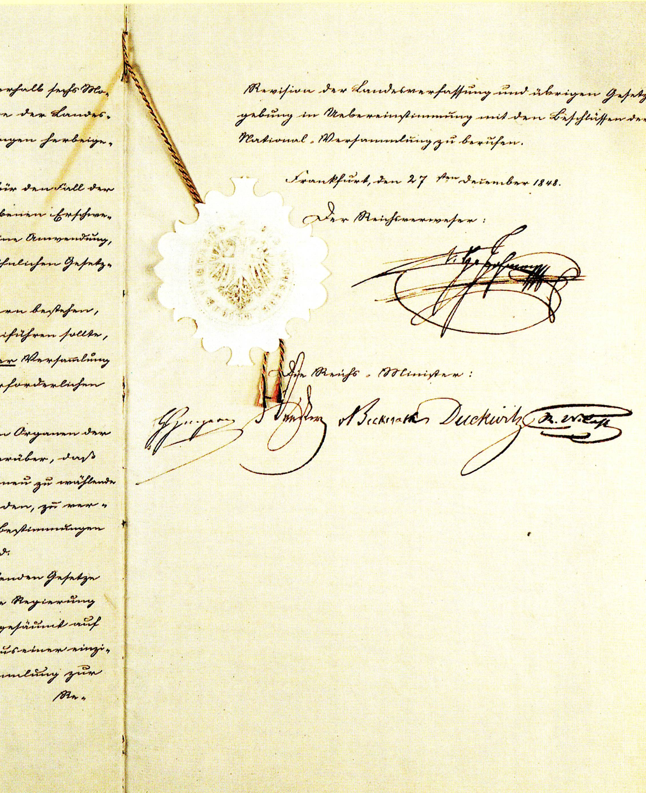 Einführungsgesetz über die Grundrechte des deutschen Volkes. 27. Dezember 1848.